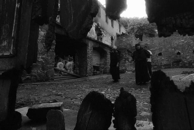 Косово и Метохија: Манастир Девич су албански терористи разорили 17. марта 2004. године и силовали једну стару монахињу. Фотографија из пројекта "Корени душе". Фото:Дарко Дозет